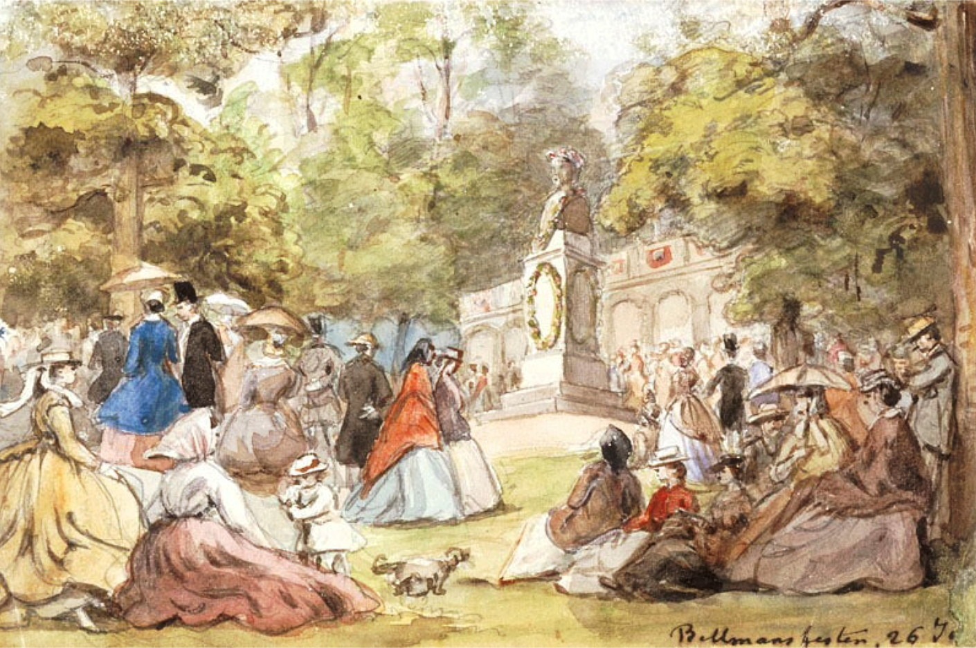 Bellmansfesten den 26 juli (okänt år), akvarell av konstnären Fritz von Dardel (1817-1901) vid Bellmansro på Djurgården i Stockholm, Sverige. Underlag: Papper. Mått i mm: 117X174 . Inventarienummer SSM 503154.